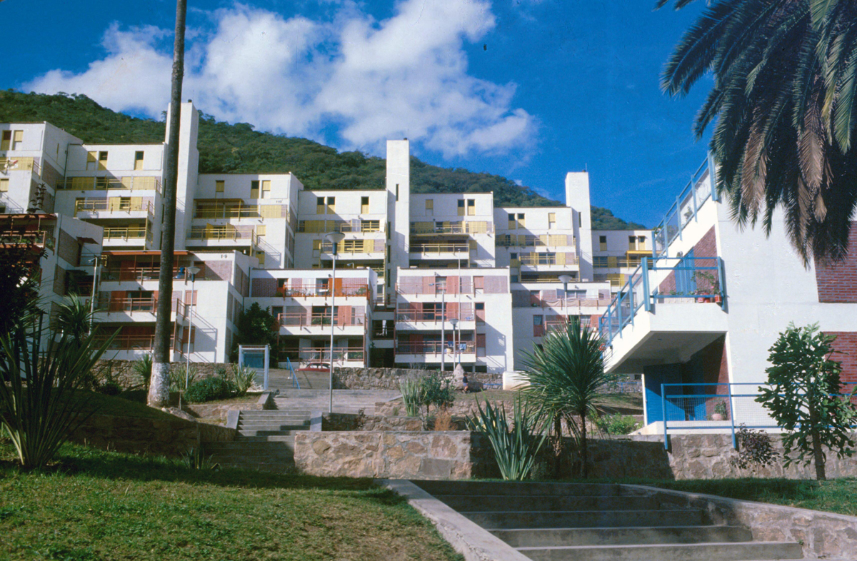 Conjunto de Viviendas San Bernardo (Miguel Ángel Roca, 1971-75). Ubicado en la provincia de Salta, Argentina.